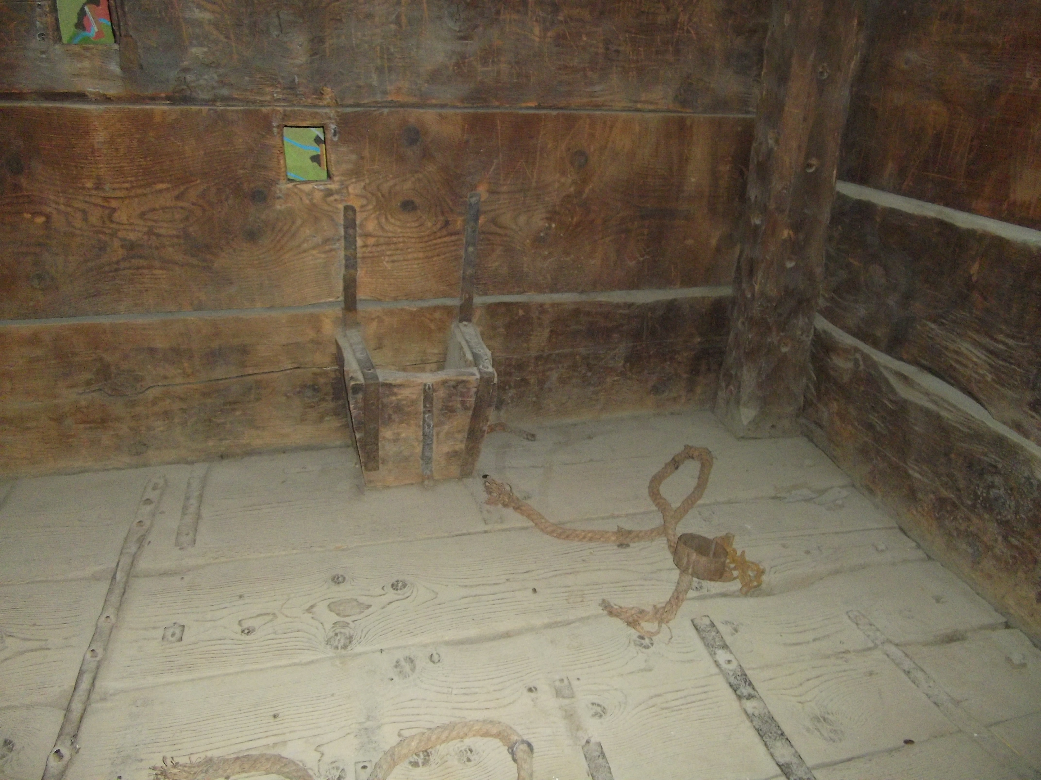 Innenansicht eines Raubgrafenkastens, Quedlinburg